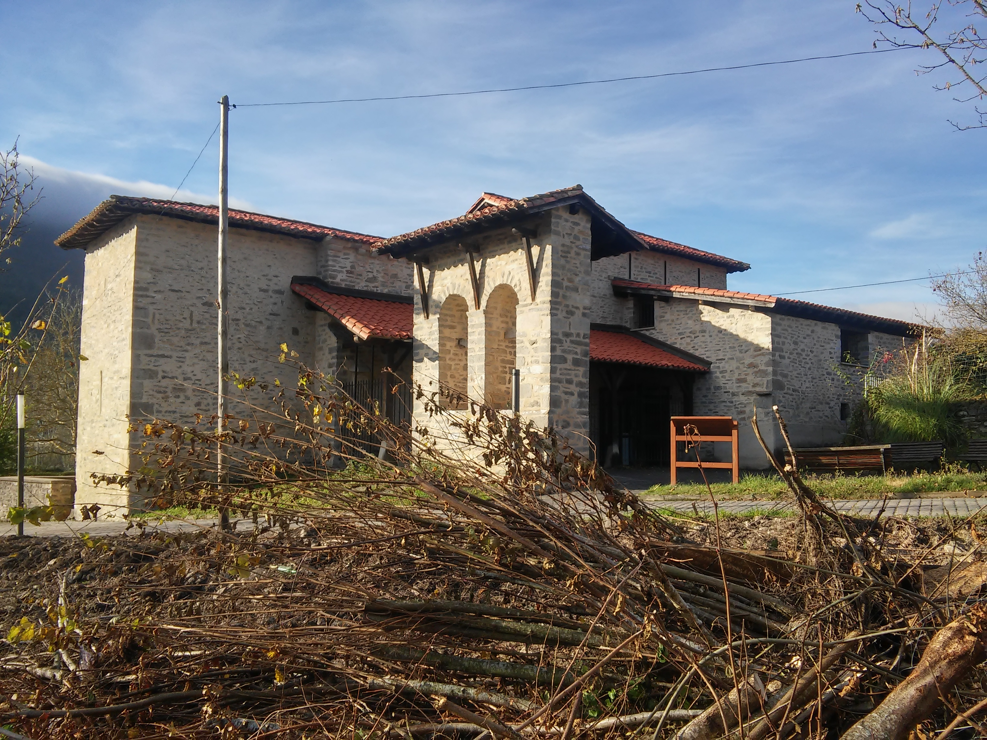 Urbina Basabeko dorrea (Kuartango)